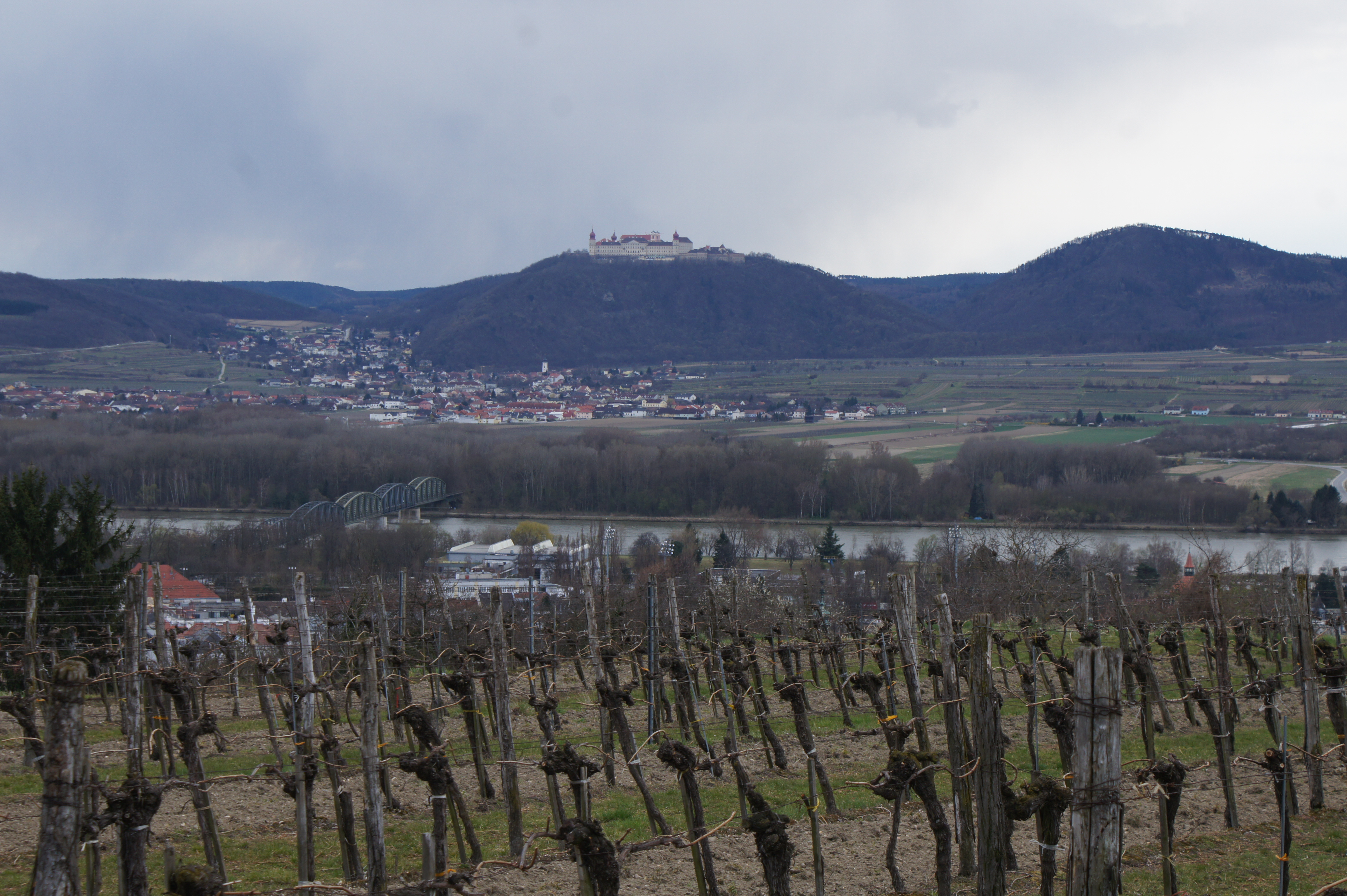 Gesamtanlage Stift Göttweig samt Vorgängerbauten, frühere Besiedlung